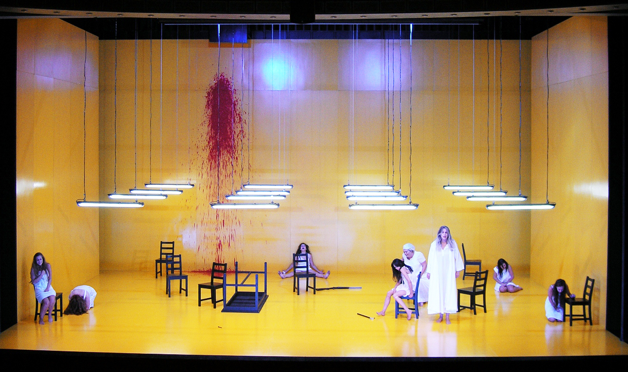 בית ברנרדה אלבה, במאי: גדי רול, עיצוב תפאורה: רוני תורן, עיצוב תלבושות: יהודית אהרון, עיצוב תאורה: פליס רוס. תיאטרון באר שבע, 2014.